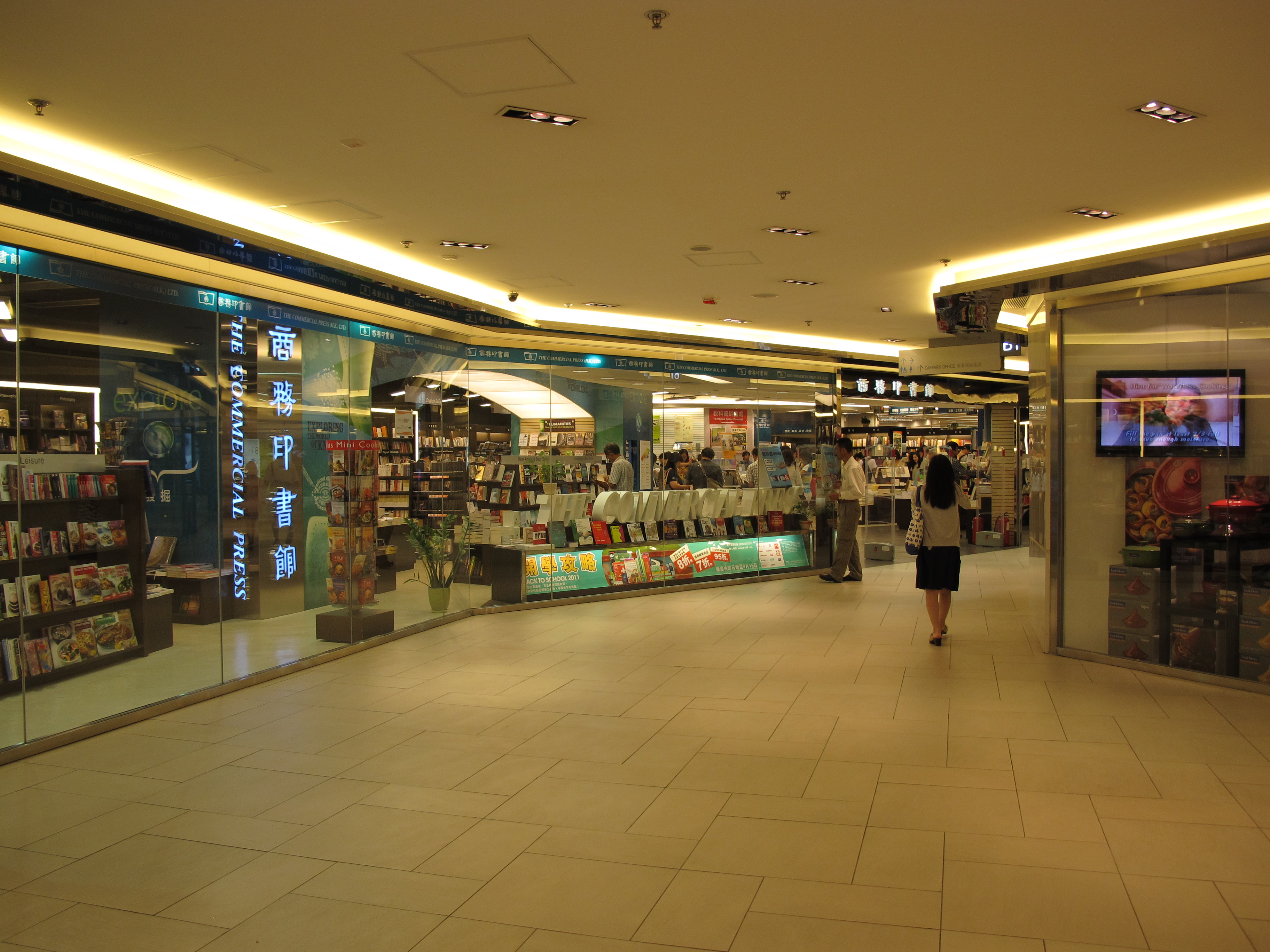 Mira Mall Commercial Press Store